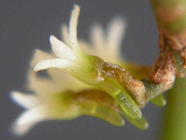 Campylocentrum ornithorrhynchum - São Paulo